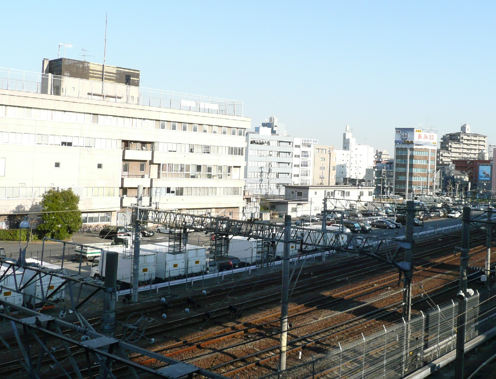 田端操駅